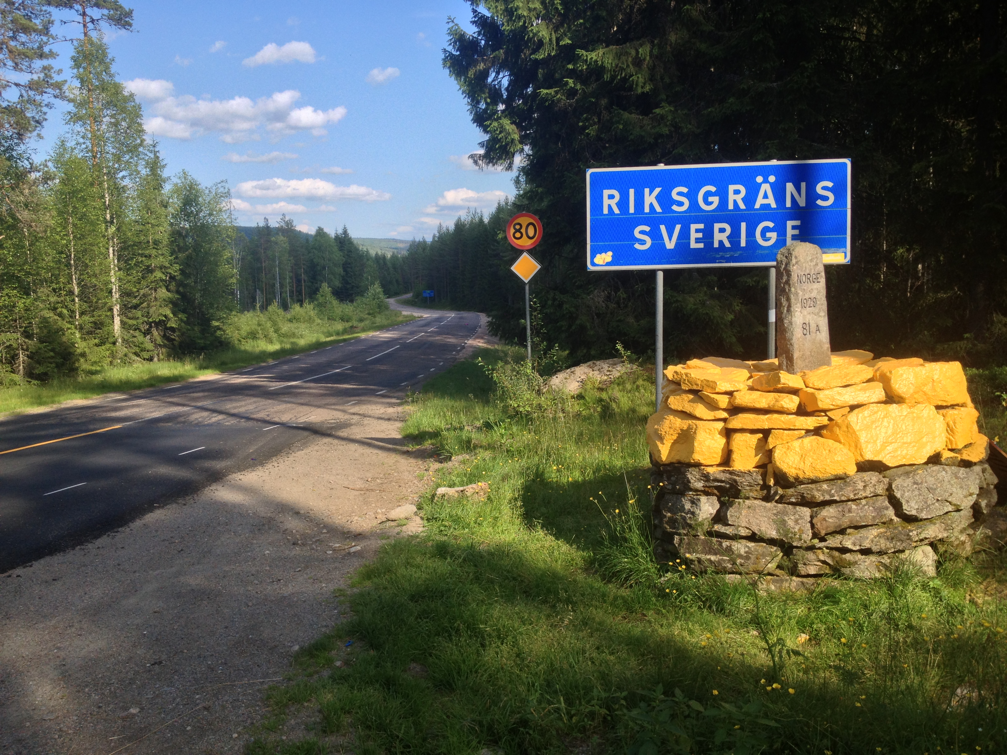 Torsby V, Sweden